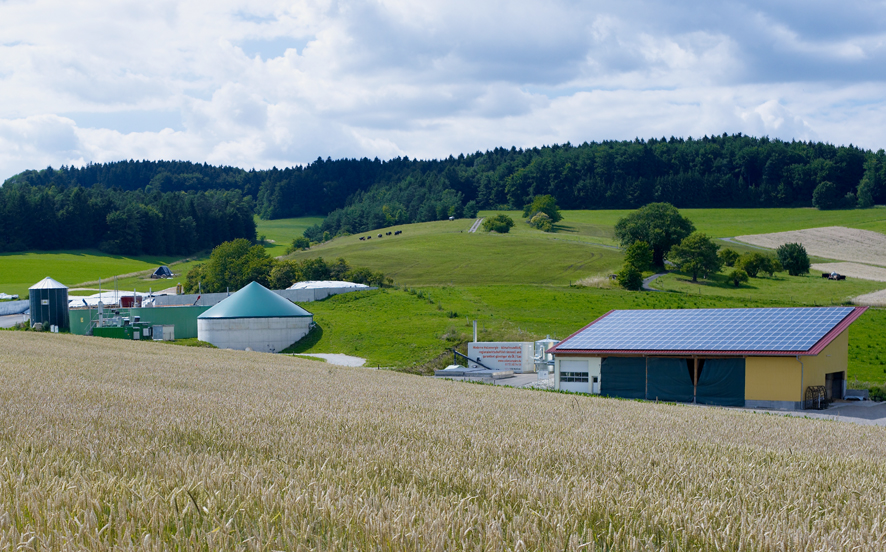 Biogasanlage, Hackschnitzelheizung und Dach-Photovoltaikanlage des Bioenergiedorfes Mauenheim; Immendingen